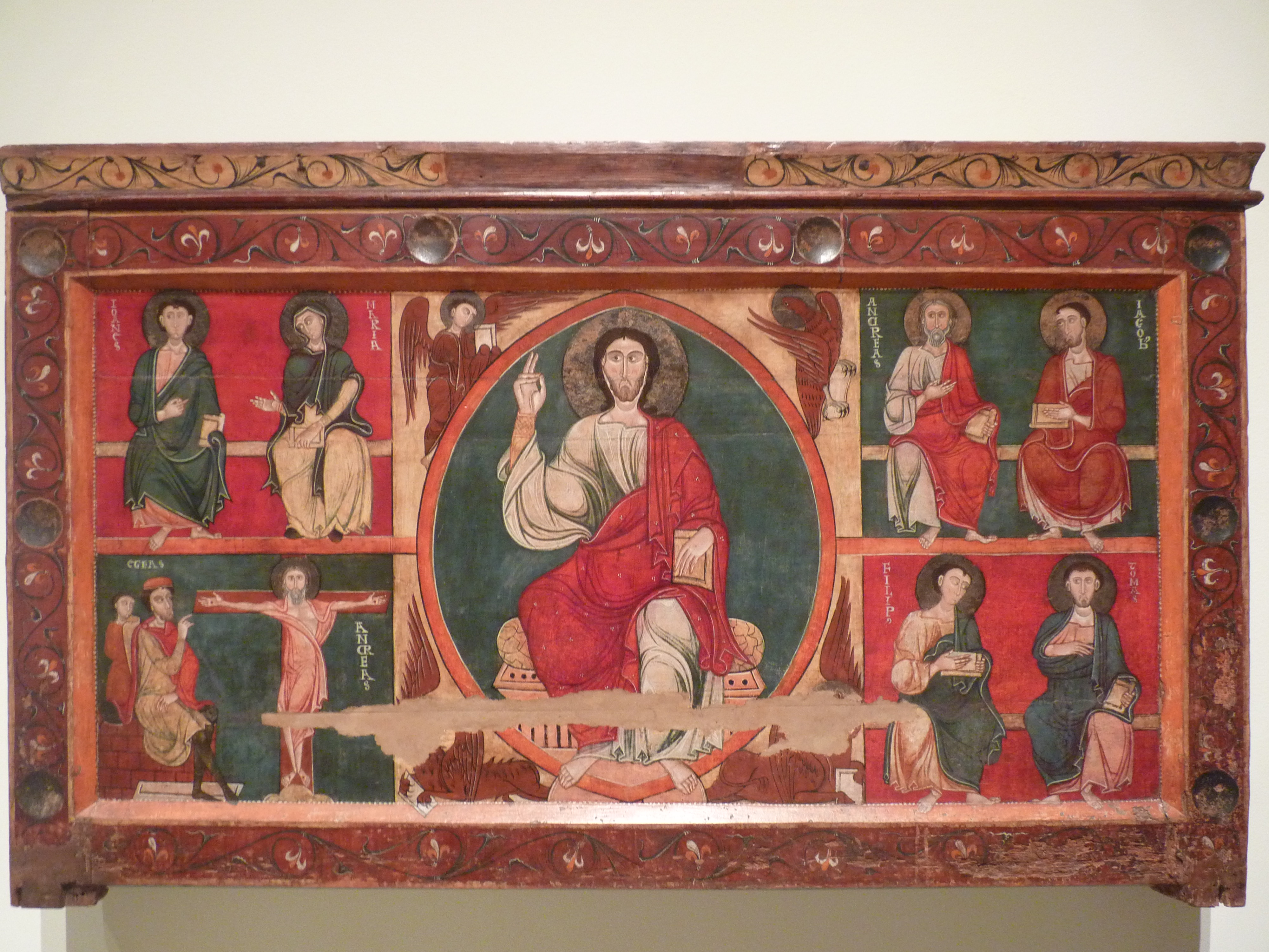 Frontal d'altar de Baltarga. TALLER DE MESTRE ALEXANDER. Cap a 1200